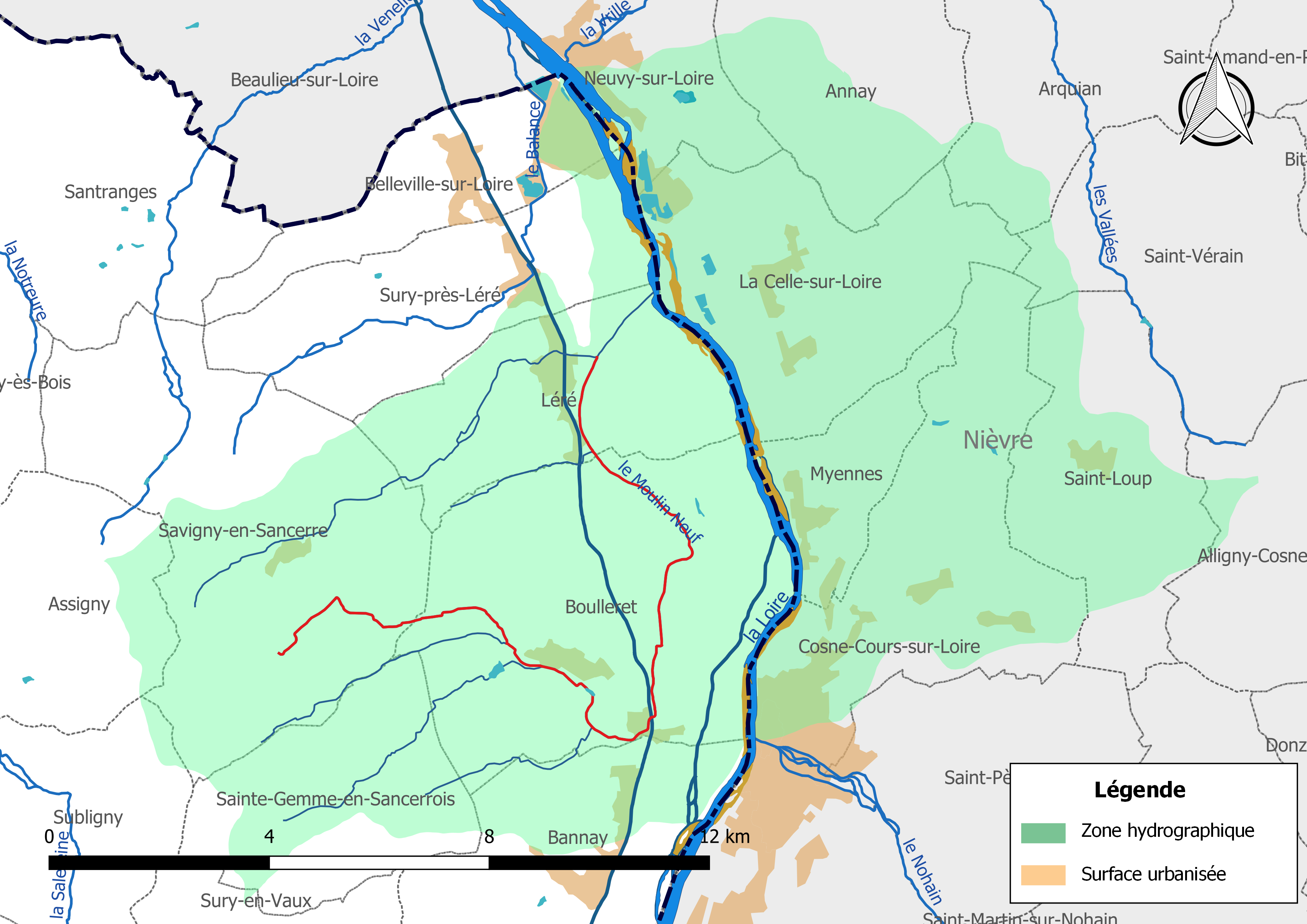 Carte du cours d'eau « le Moulin Neuf » (France) et de la zone hydrographique dans laquelle il s'insère.